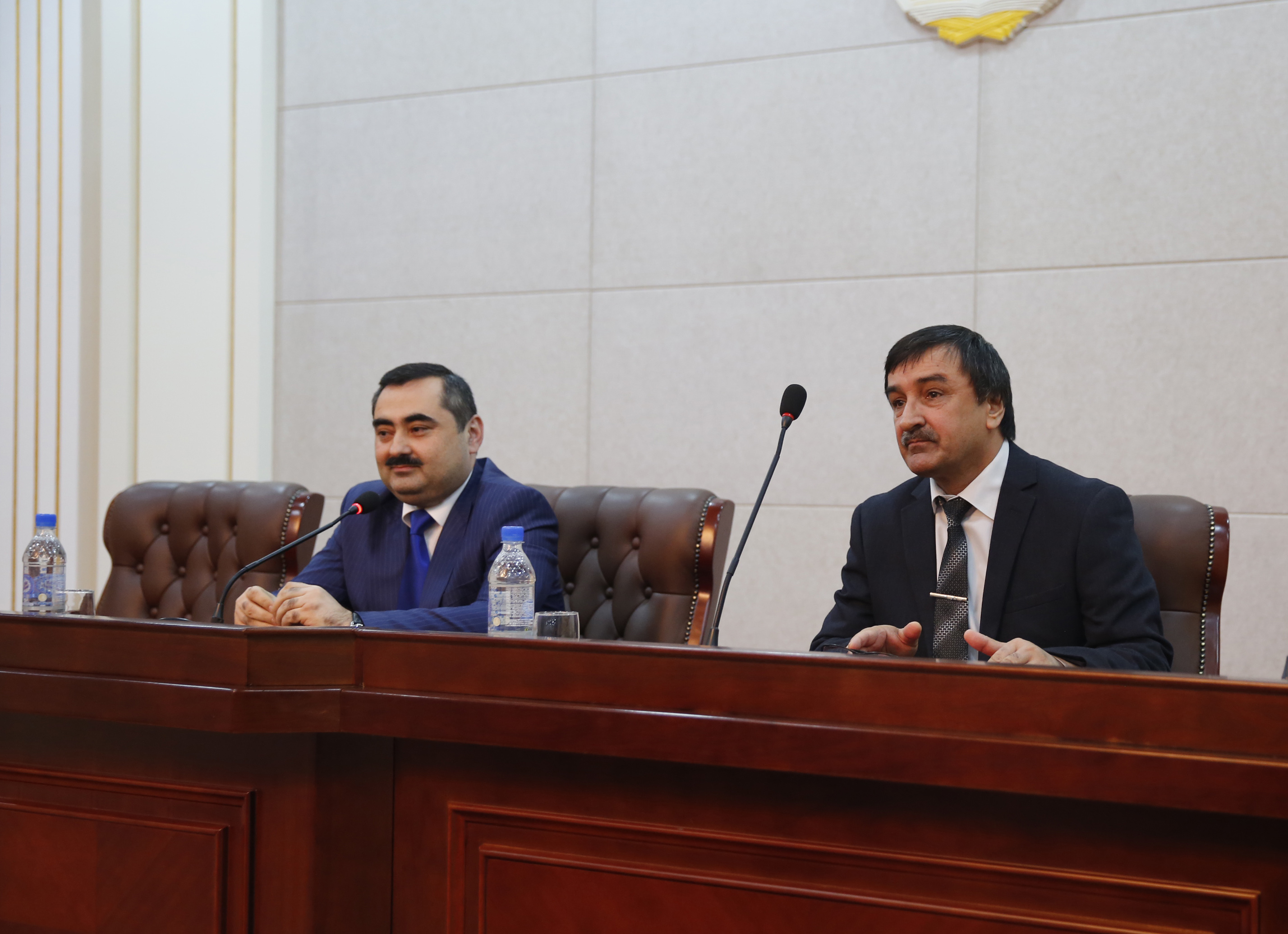 Тоҷикӣ: Салими Хатлонӣ